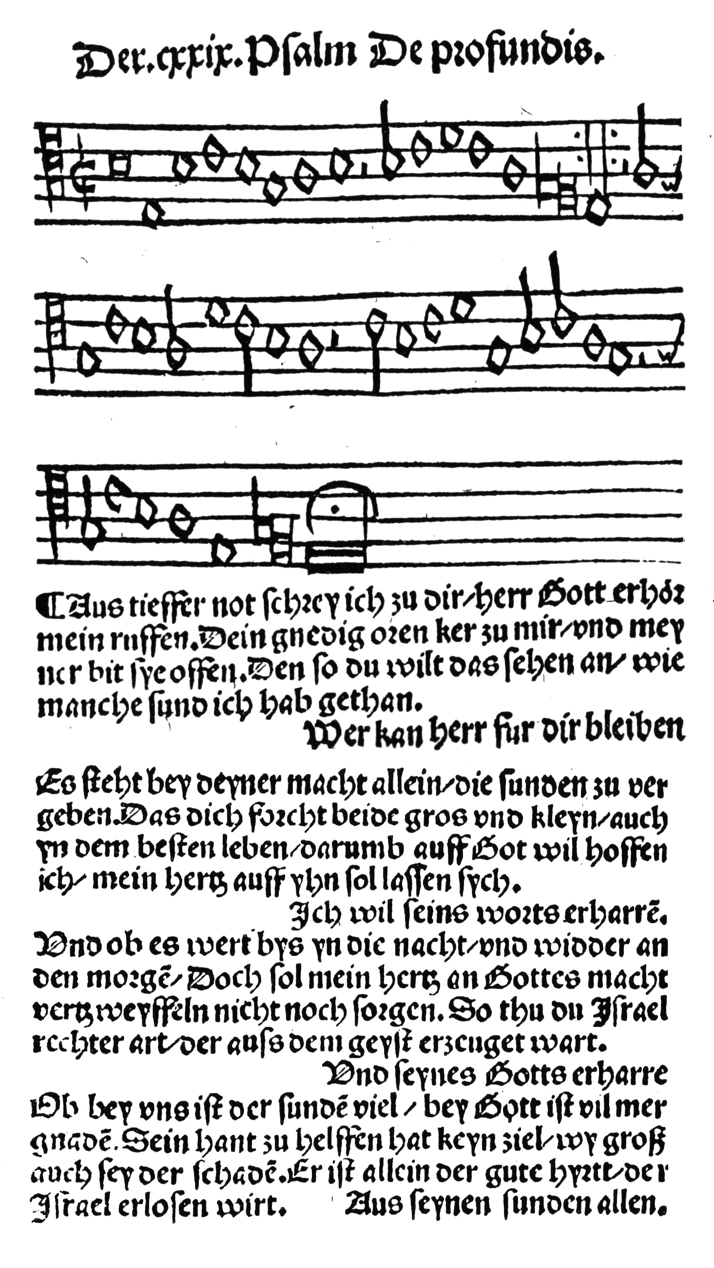 Aus tiefer Not schrei ich zu dir, 4-strophige Version, Erfurter Enchiridion 1524